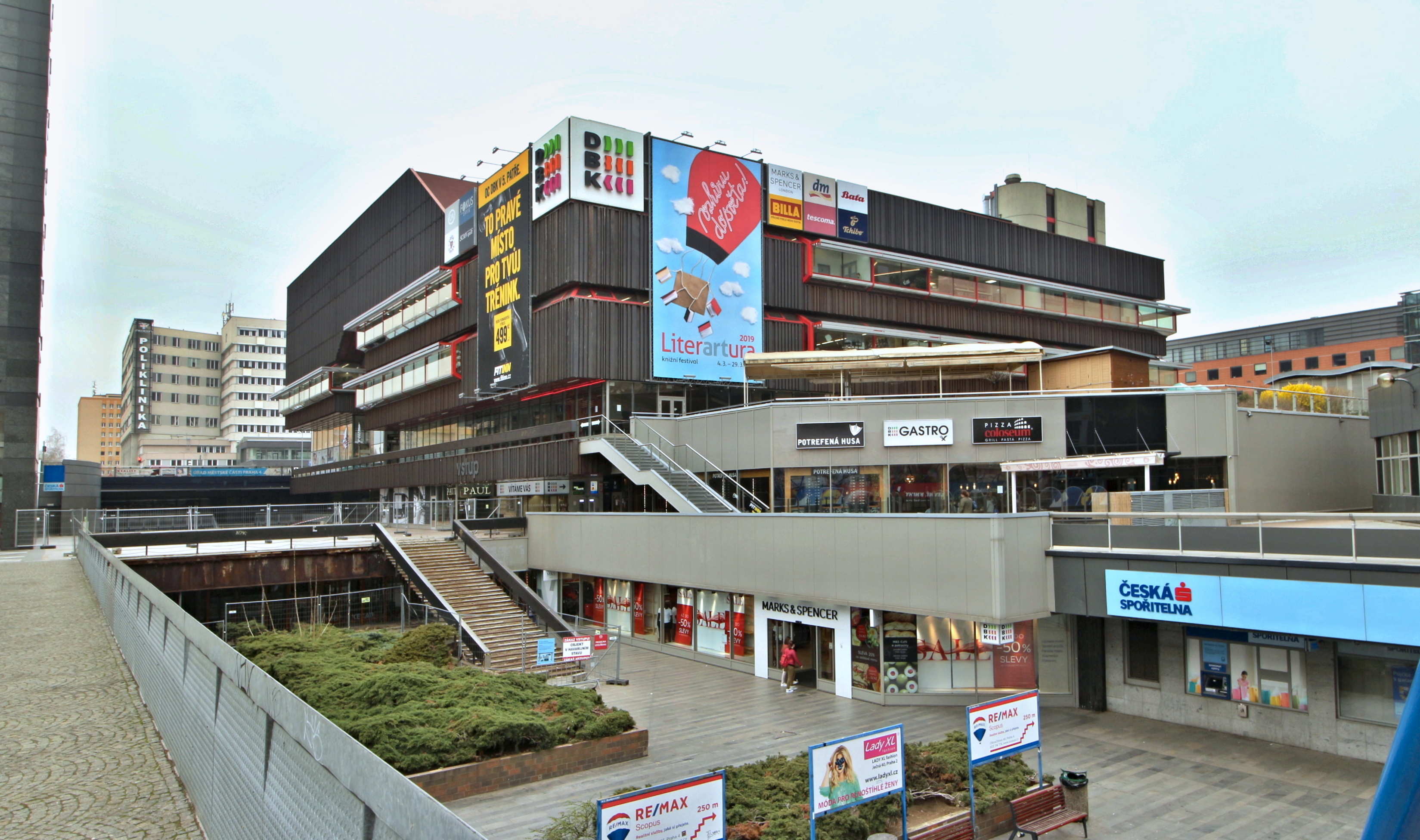 Praha, Budějovická - Dům bytové kultury